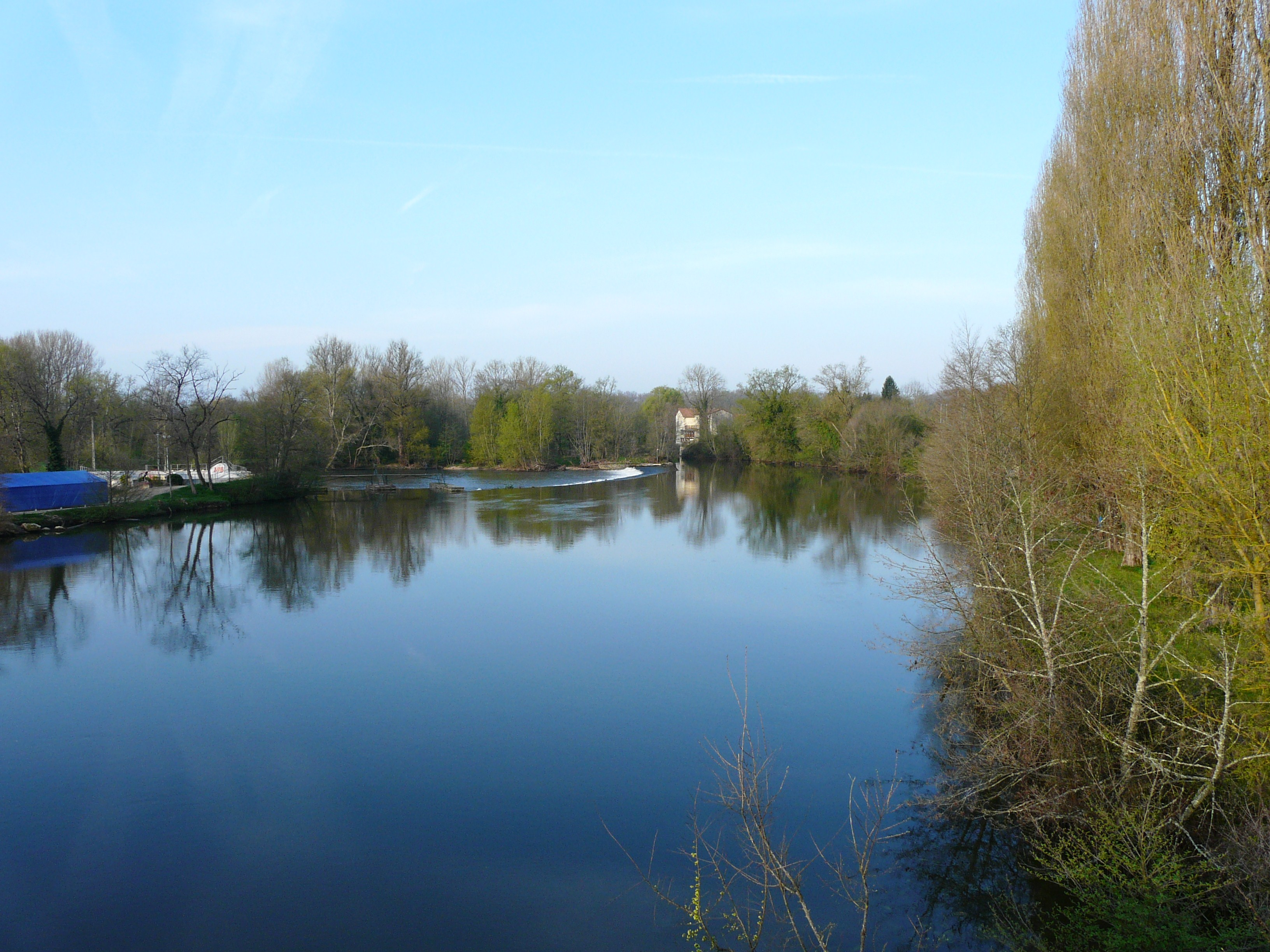 L'Isle en aval du pont de la route départementale 41E2 à Saint-Léon-sur-l'Isle, Dordogne, France.